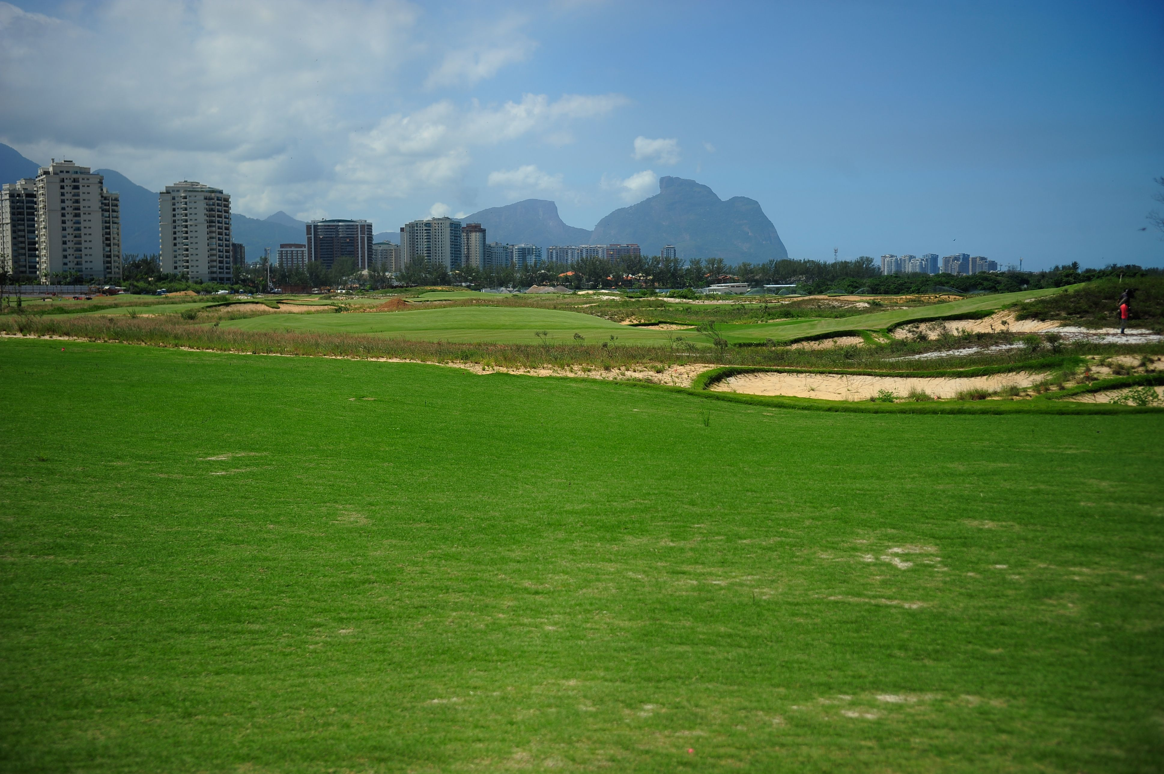 Campo Olímpico de Golfe na Barra da Tijuca, Rio de Janeiro - RJ